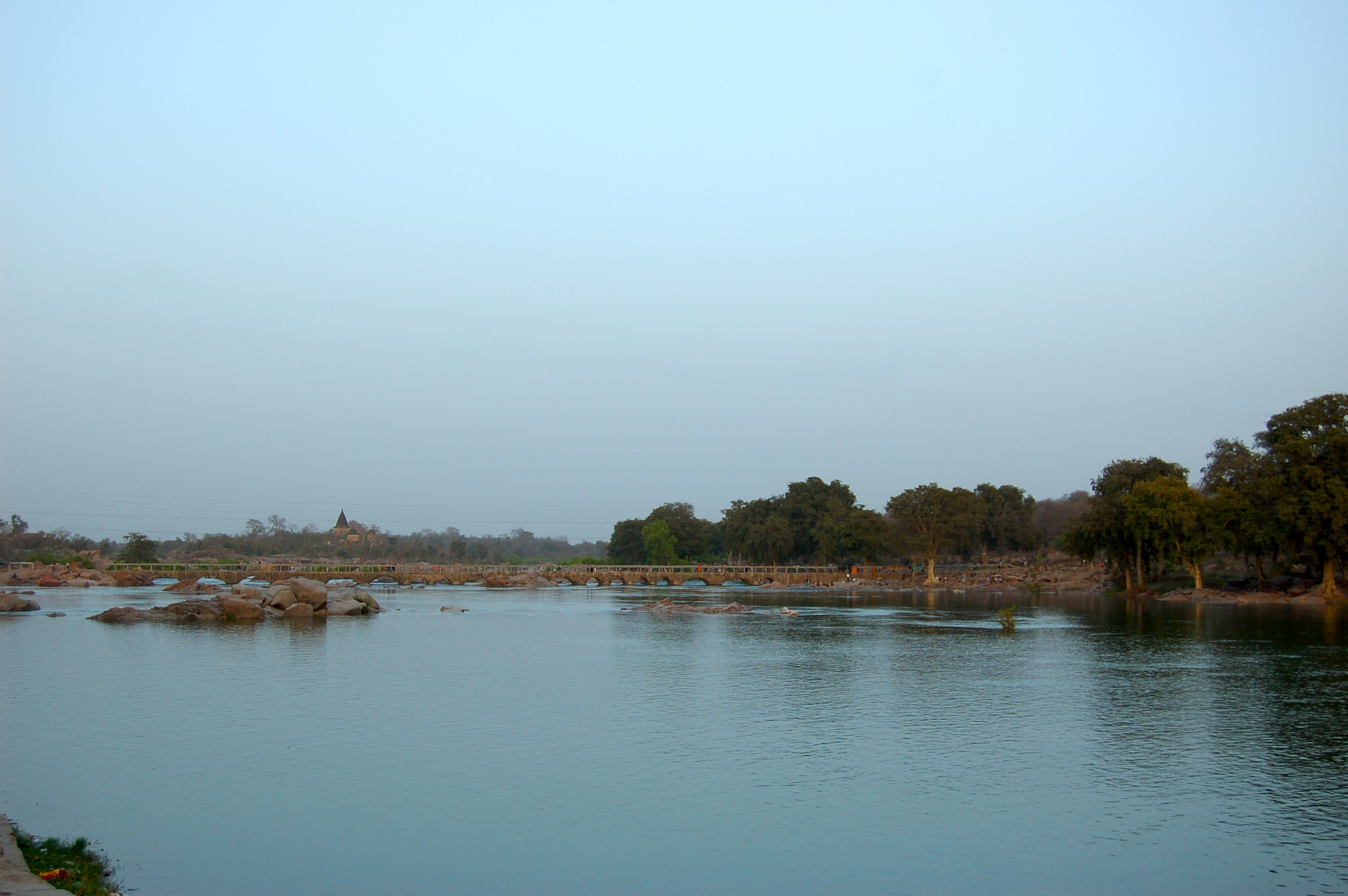 Betwa River